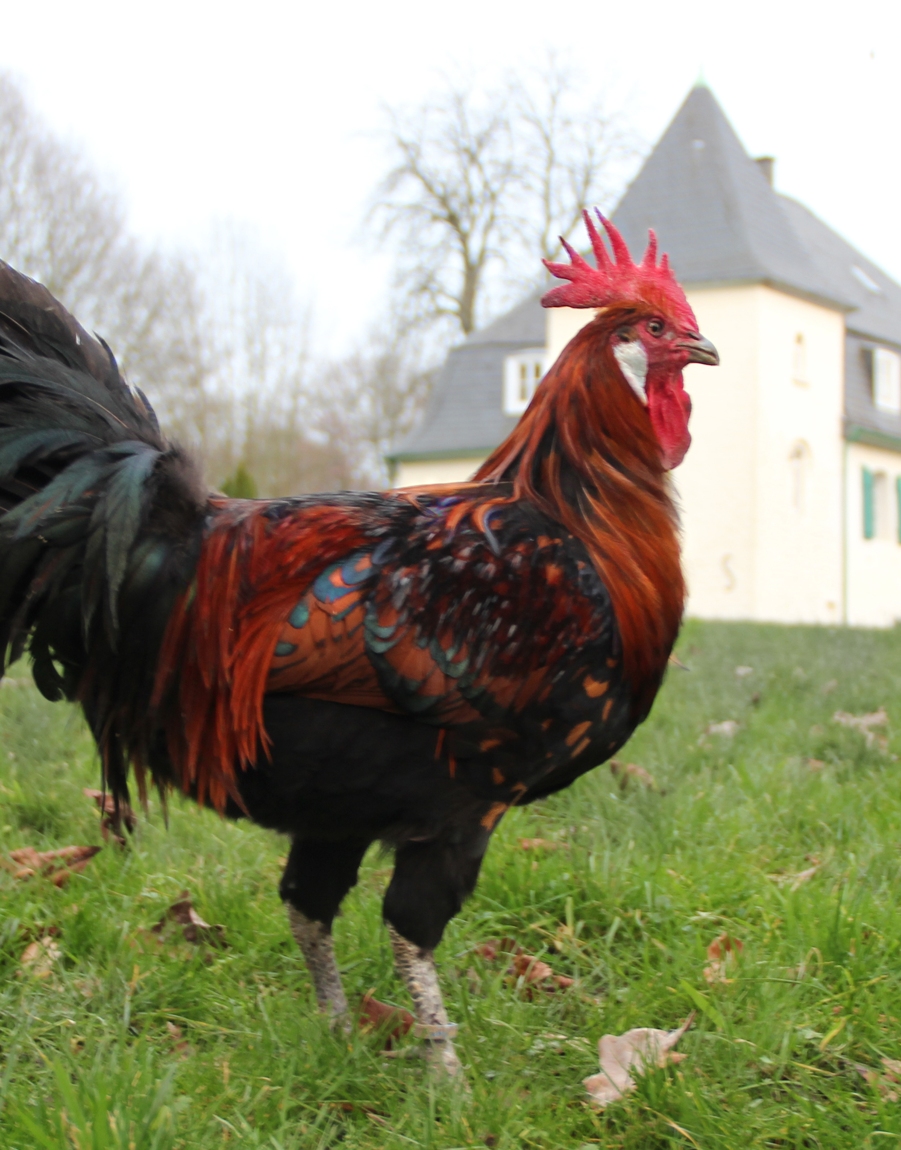 Bergse kraaierhaan bij voormalig Rittergut Goldberg (Mettmann in Noordrijn-Westfalen)